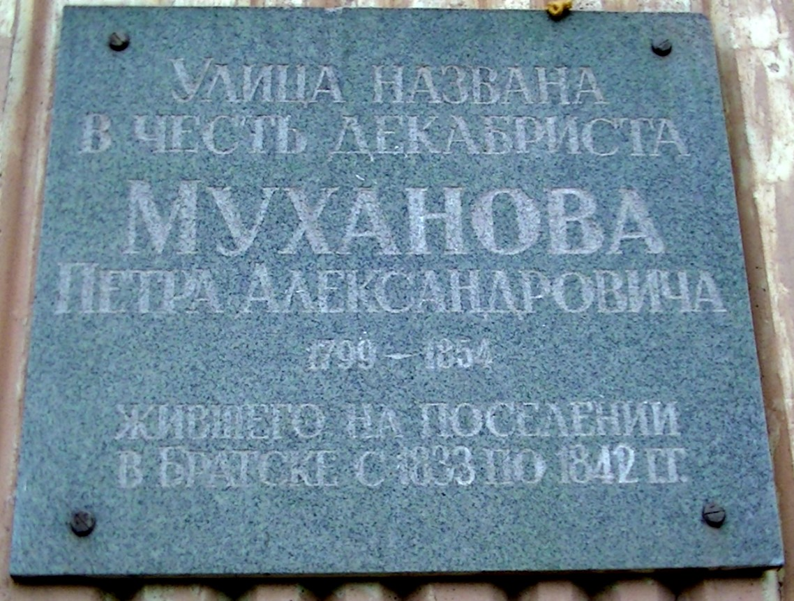 Мемориальная доска декабристу Петру Александровичу Муханову, отбывавшему ссылку в Братске.